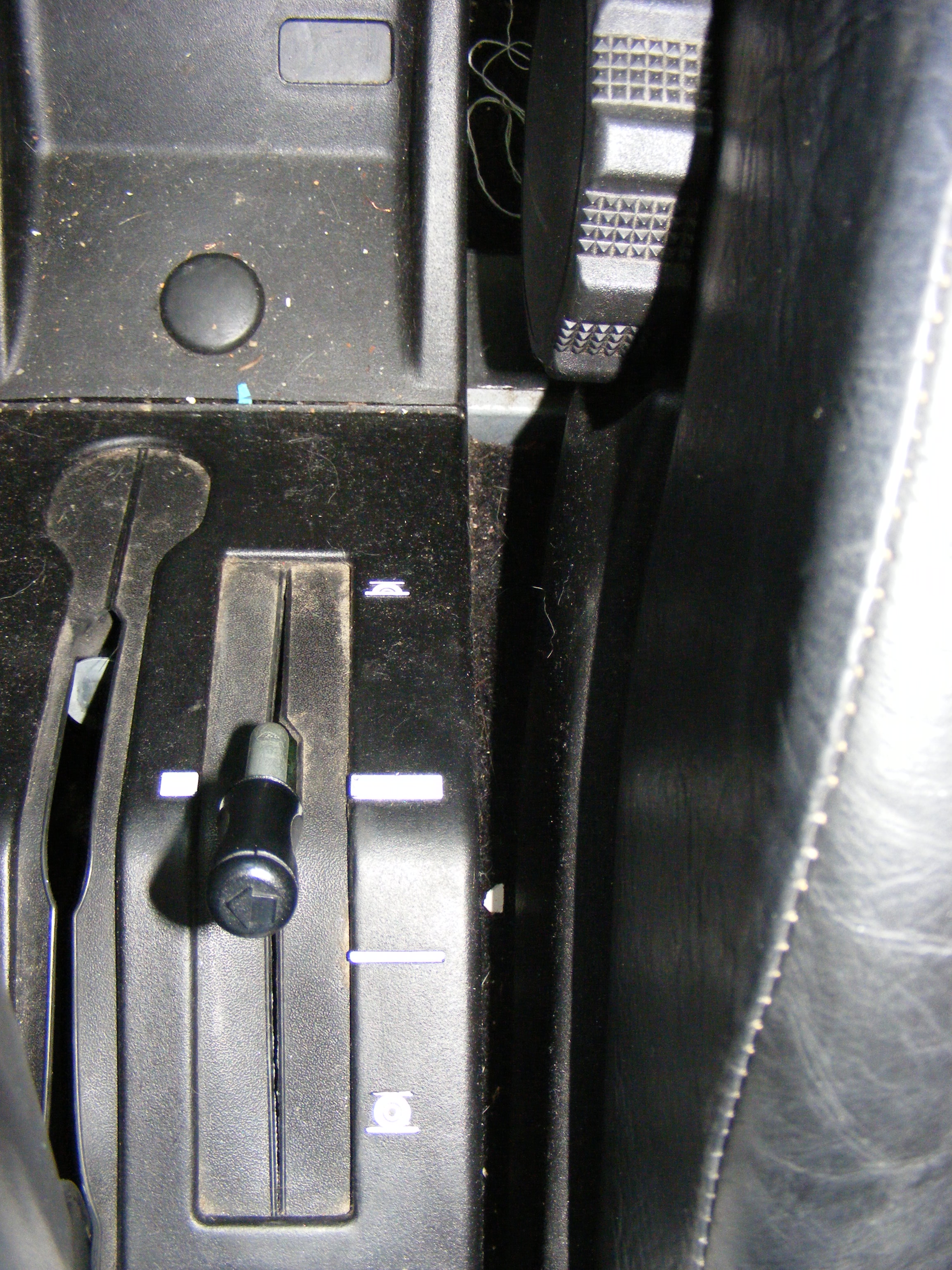 Manette de réglage des hauteurs sur Citroën BX De haut en bas : Position basse, Position route, Position intermédiaire, Position haute.